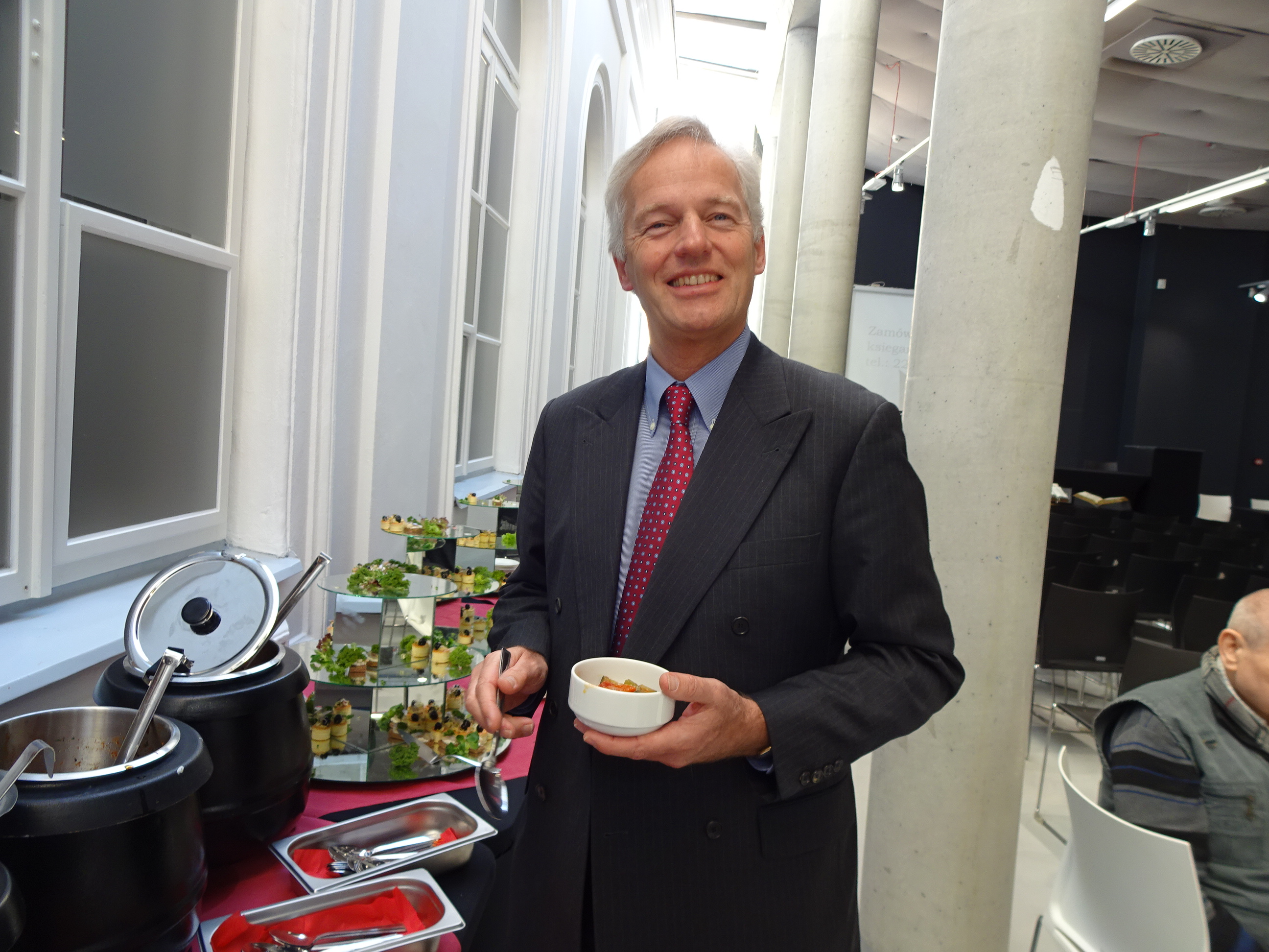 Lénart de Regt Muzeum Etnograficzne, Kredytowa 1